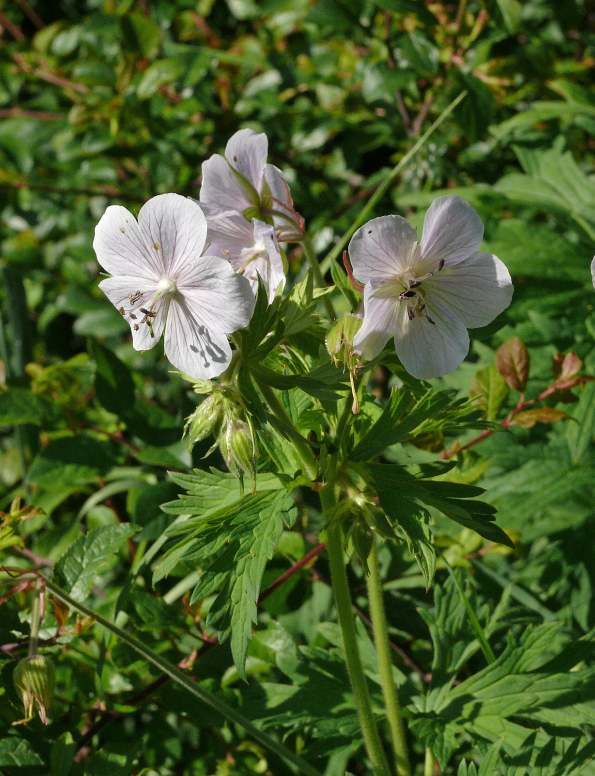 Geranium pratense, Hohenlohe, Germany